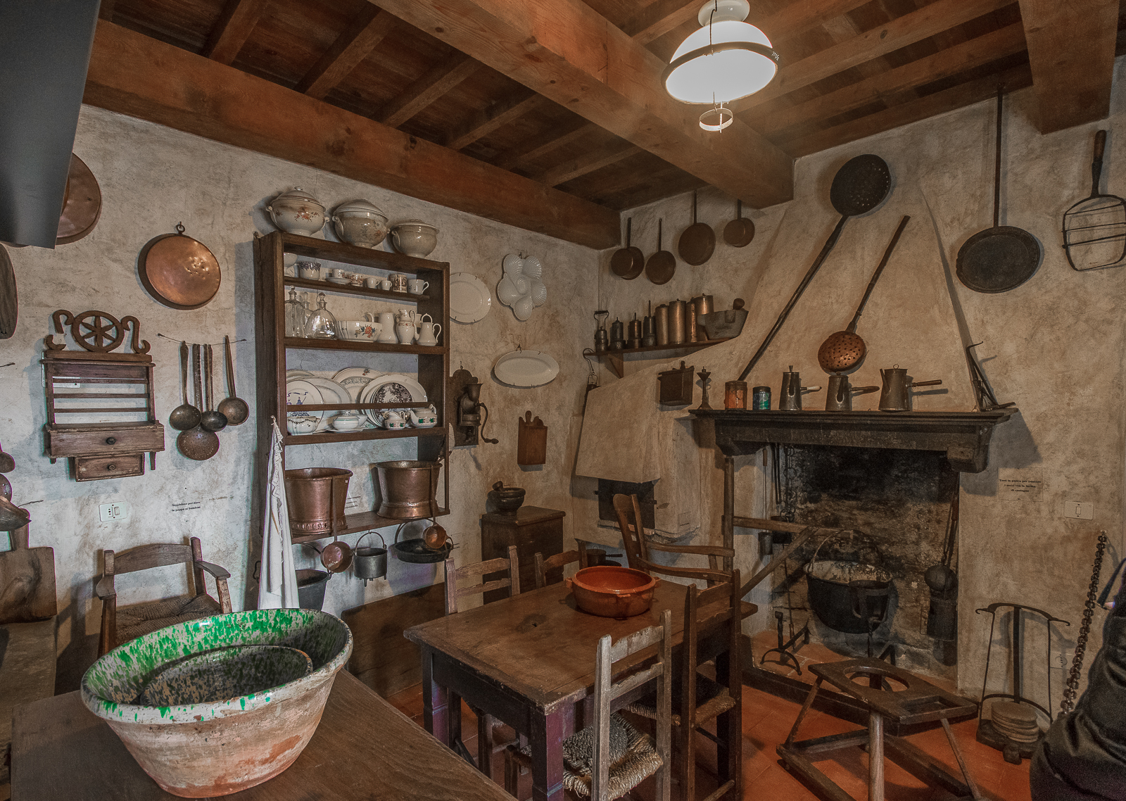 Museo della Gente dell'Appenino Pistoiese This is a photo of a monument which is part of cultural heritage of Italy.